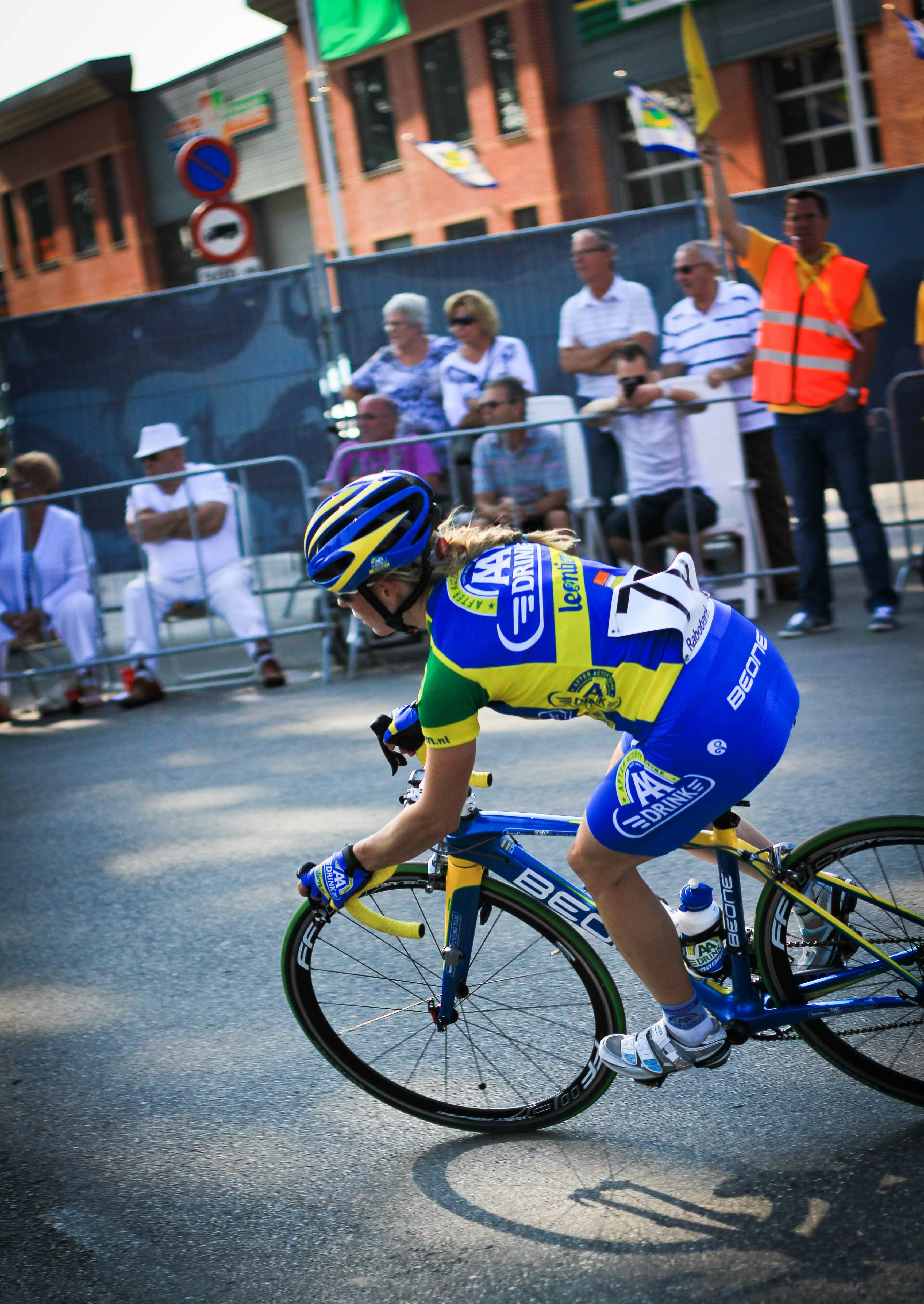 Daphny van den Brand Draai van de Kaai 2011